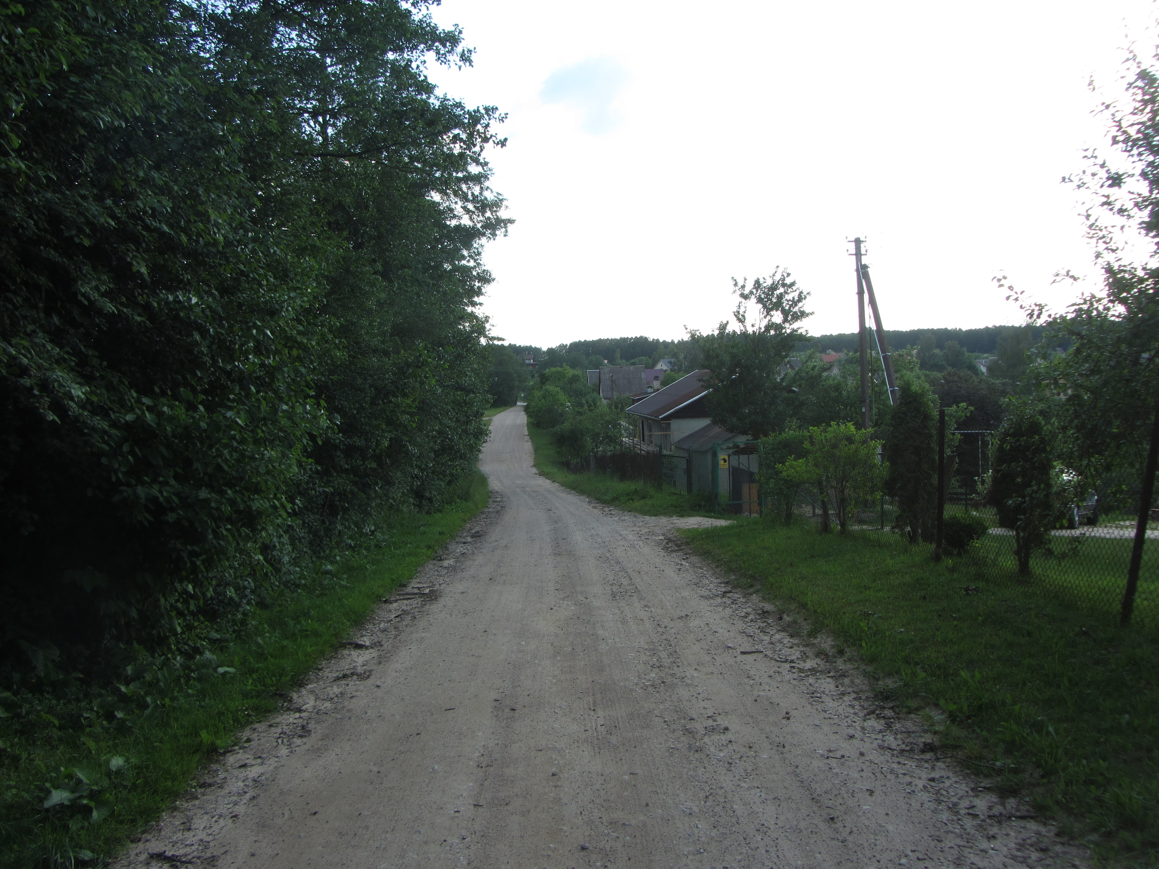 Bazorai, Lithuania